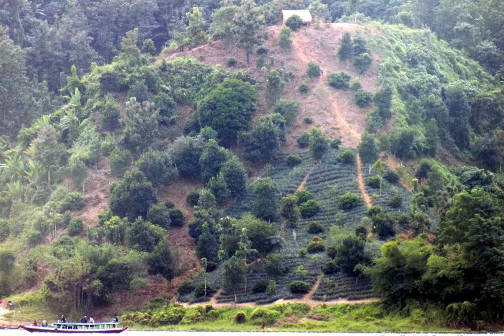 কাপ্তাই লেক,রাঙ্গামাটি